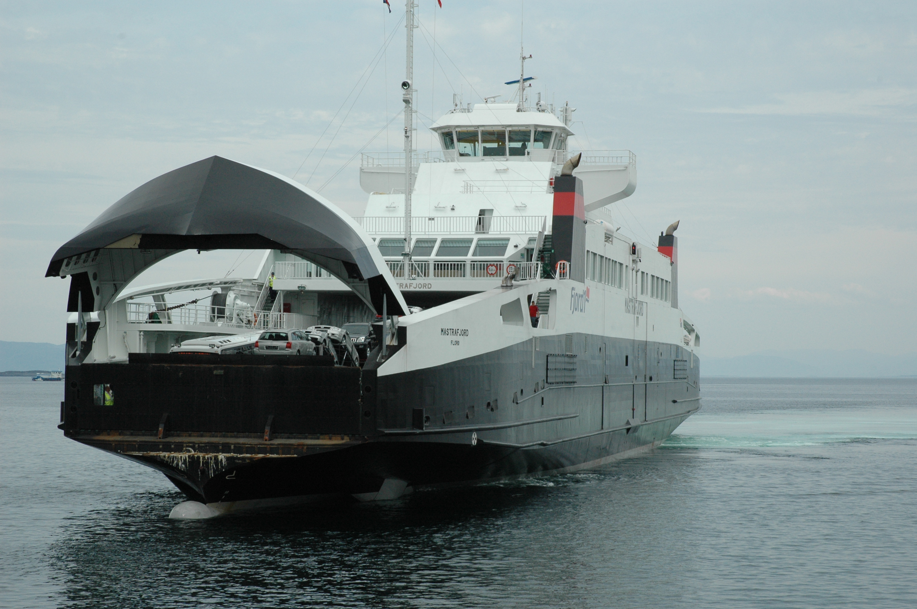 MF Mastrafjord